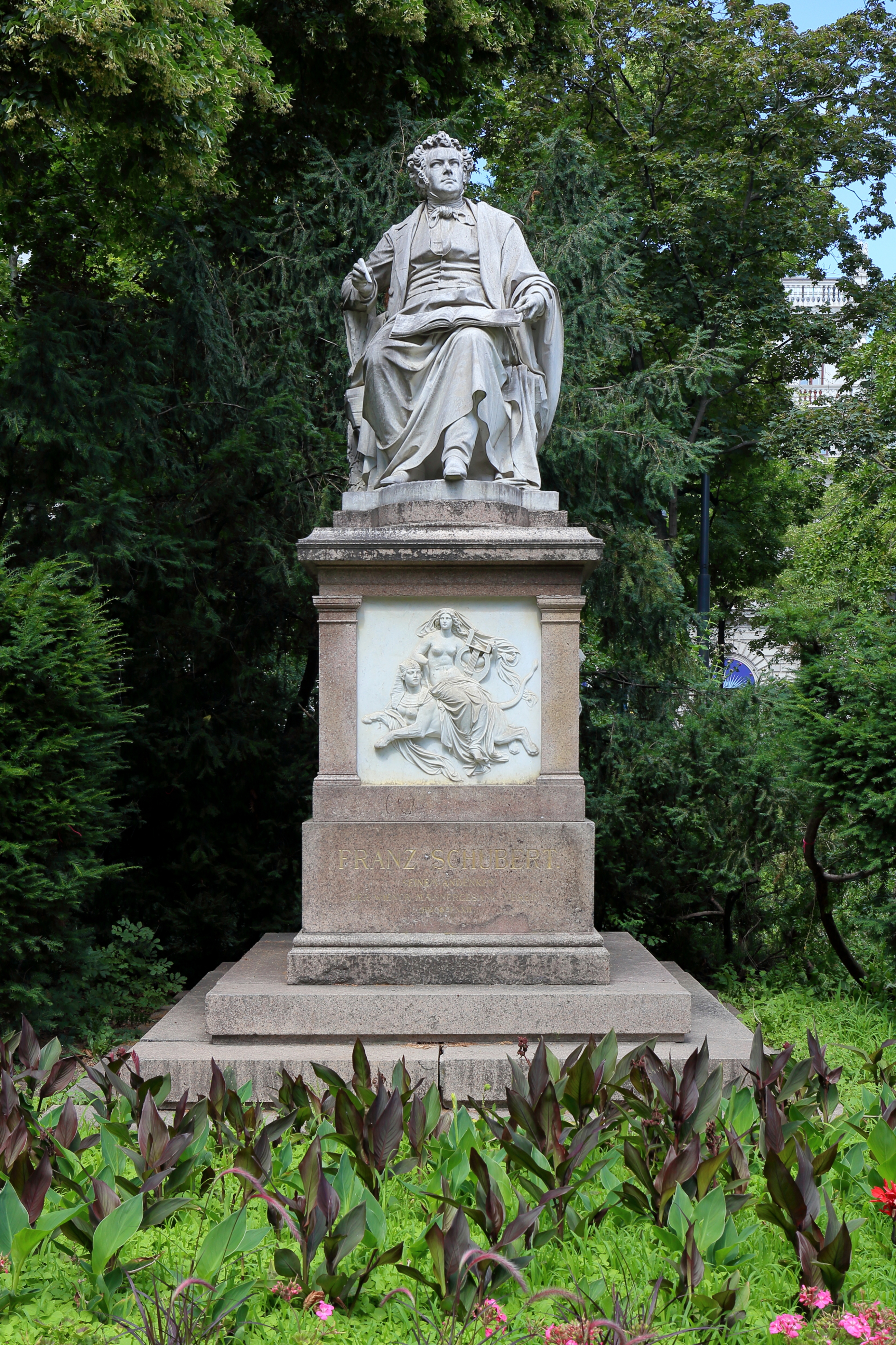 Das Franz-Schubert-Denkmal im Stadtparkt im 1. Wiener Gemeindebezirk Innere Stadt.Das Denkmal wurde vom Wiener Männergesang-Verein gestifte und am 15. Mai 1872 enthüllt (Grundsteinlegung am 12. Oktober 1868). Es wurde von Carl Kundmann geschaffen und zeigt Schubert sitzend mit Notenheft und Bleistift. Der Sockel wurde von Theophil Hansen entworfen. Die drei allegorischen Reliefs am Sockel stellen vorne die musikalische Phantasie, links die Instrumental- und rechts die Vokalmusik dar.